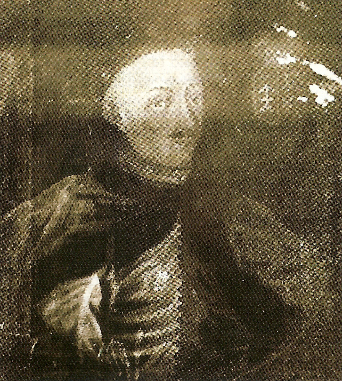 Podobizna nieznanego szlachcica z Modliboorzyc.